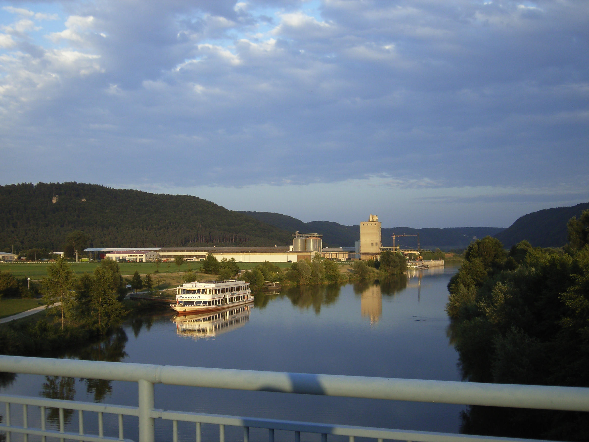 Altmühltal bei Dietfurt, Blick auf Hafen